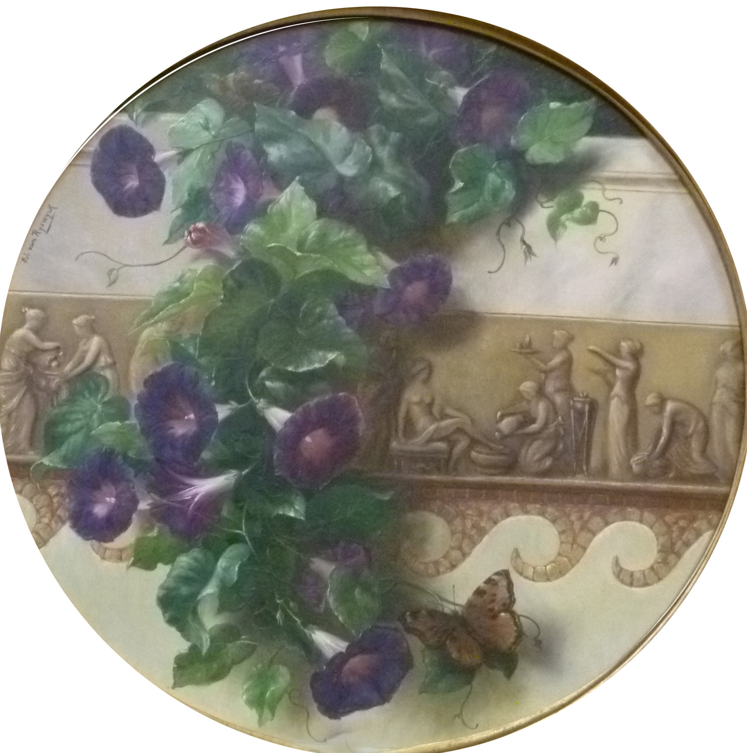 "belles du jour", olieverf op paneel (46 x 46 cm) door de Belgische kunstschilder Edward Van Ryswyck (1871-1936); privébezit